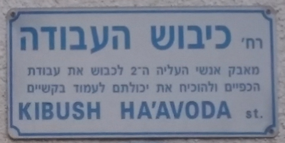 רחוב כיבוש העבודה בהרצליה